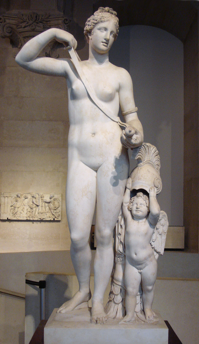 Vênus armada e Eros. Autor desconhecido, mármore,século II. Antiga coleção Borghese. Restaurada no século XVI.